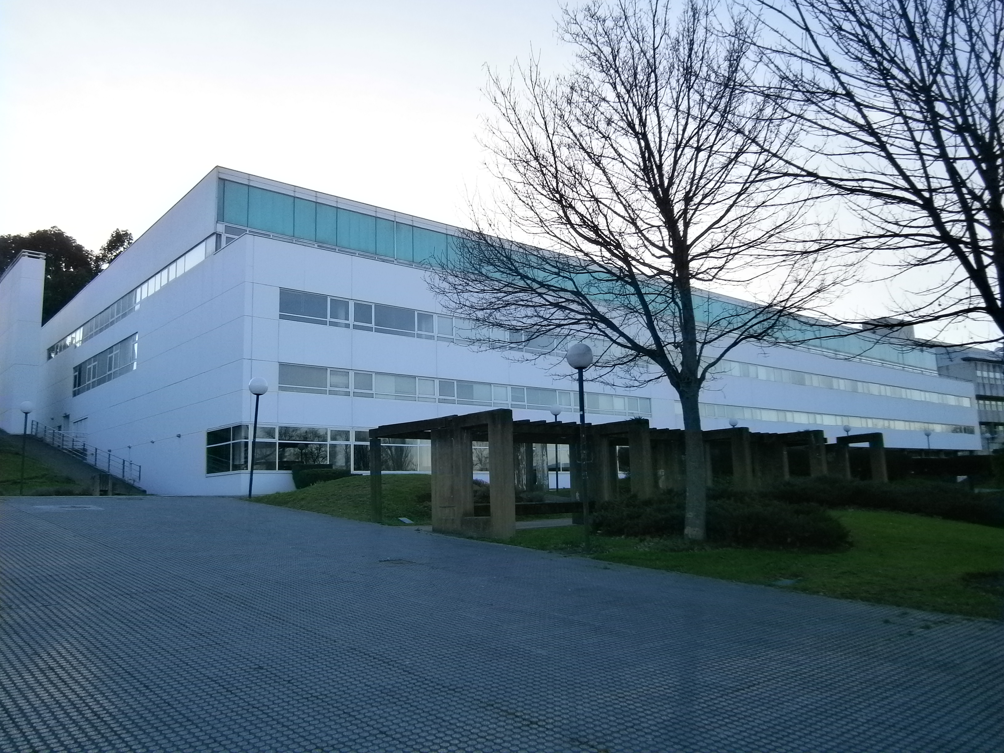 Facultade de Dereito da Universidade da Coruña